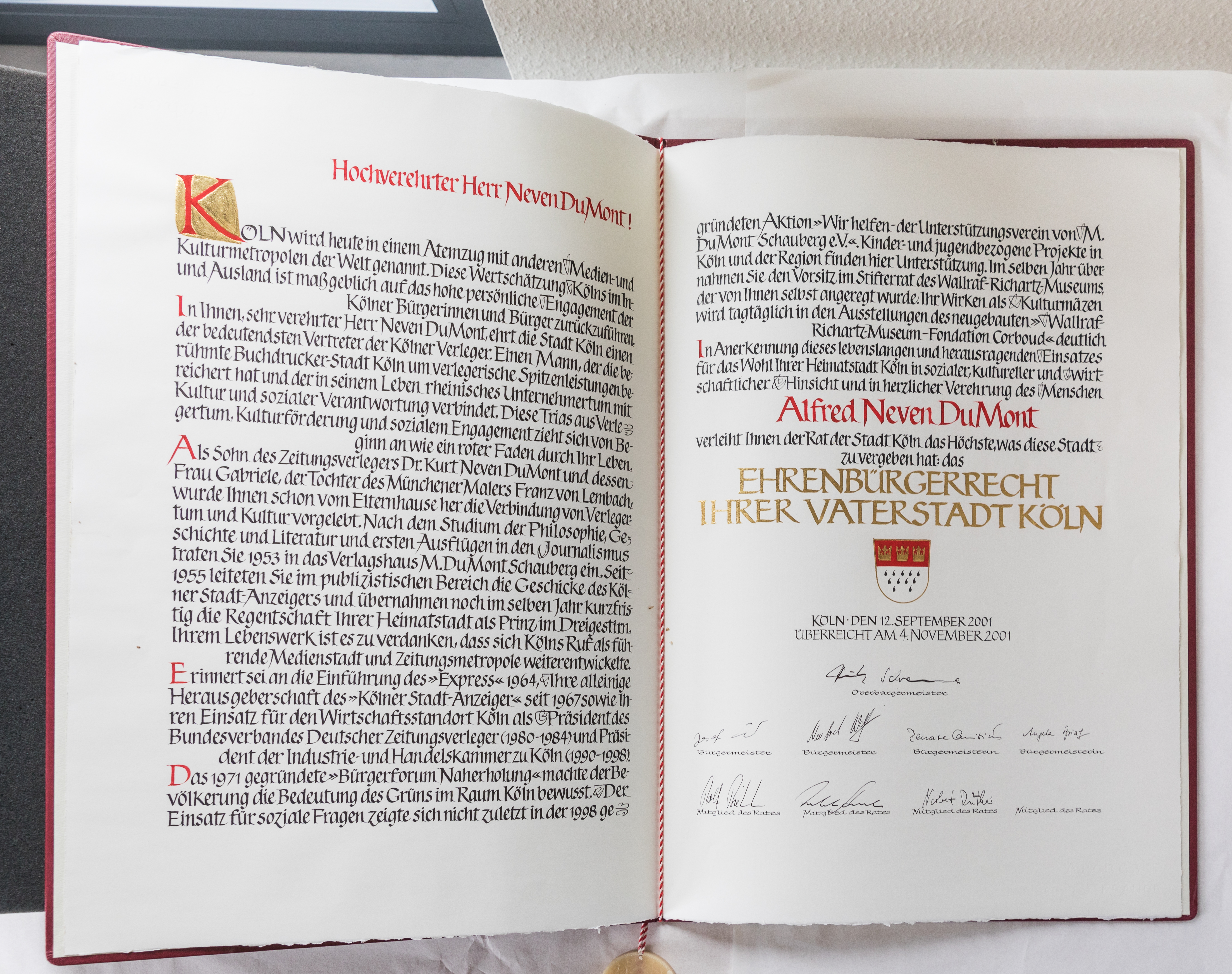 Der persönliche Nachlass des Kölner Verlegers Alfred Neven DuMont wurde fünf Jahre nach seinem Tod von der Familie an das Historische Archiv der Stadt Köln übergeben Foto: Urkunde zur Verleihung des Ehrenbürgerrechts an Alfred Neven DuMont 2001